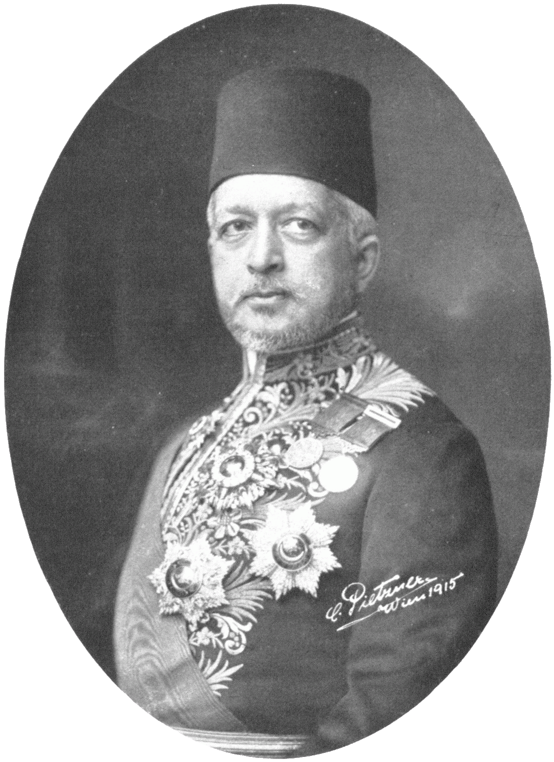 Said Halim Pasha (1865-1921), Turkish minister